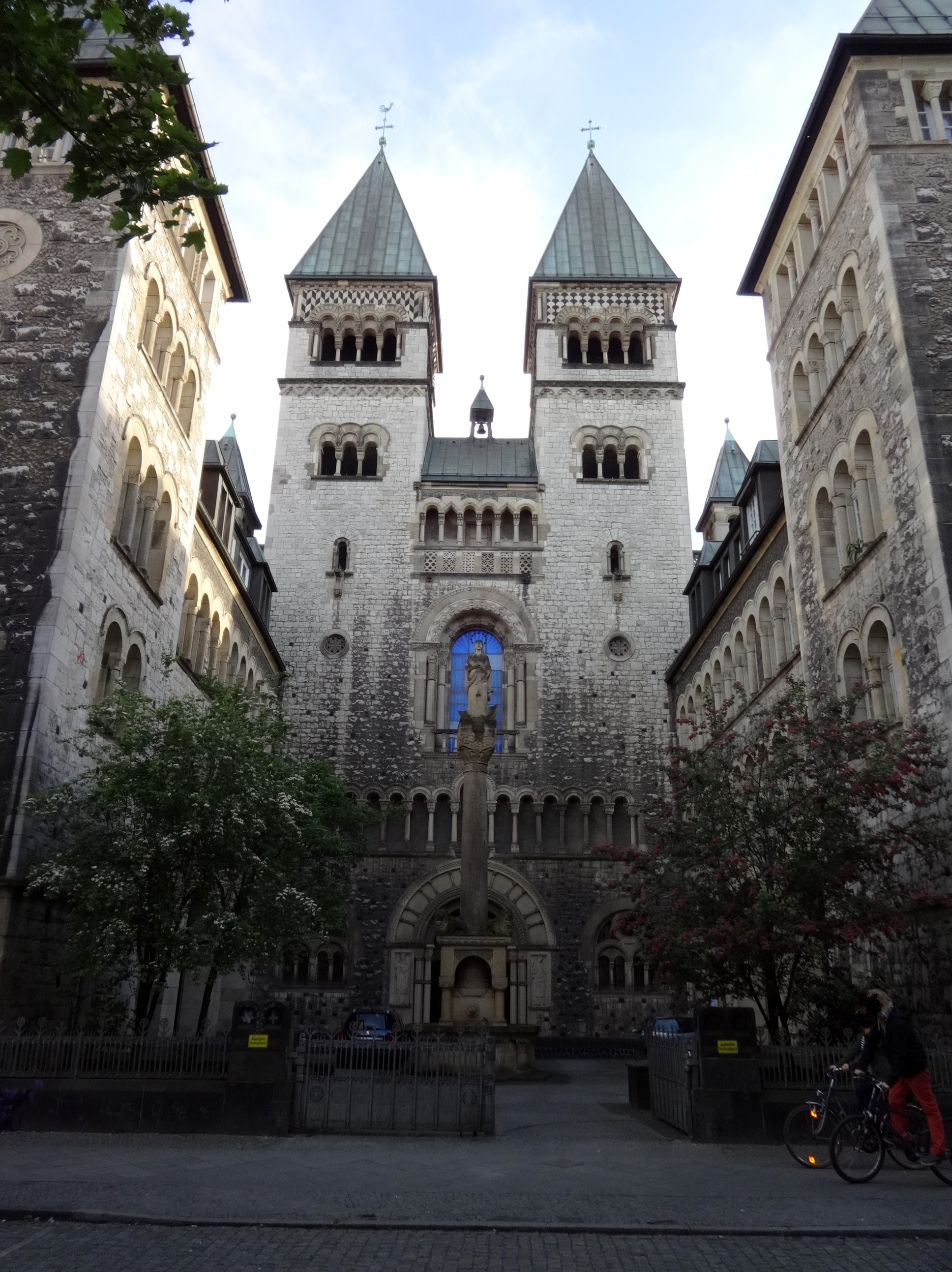 Portal der St. Marien-Kirche in Berlin-Kreuzberg